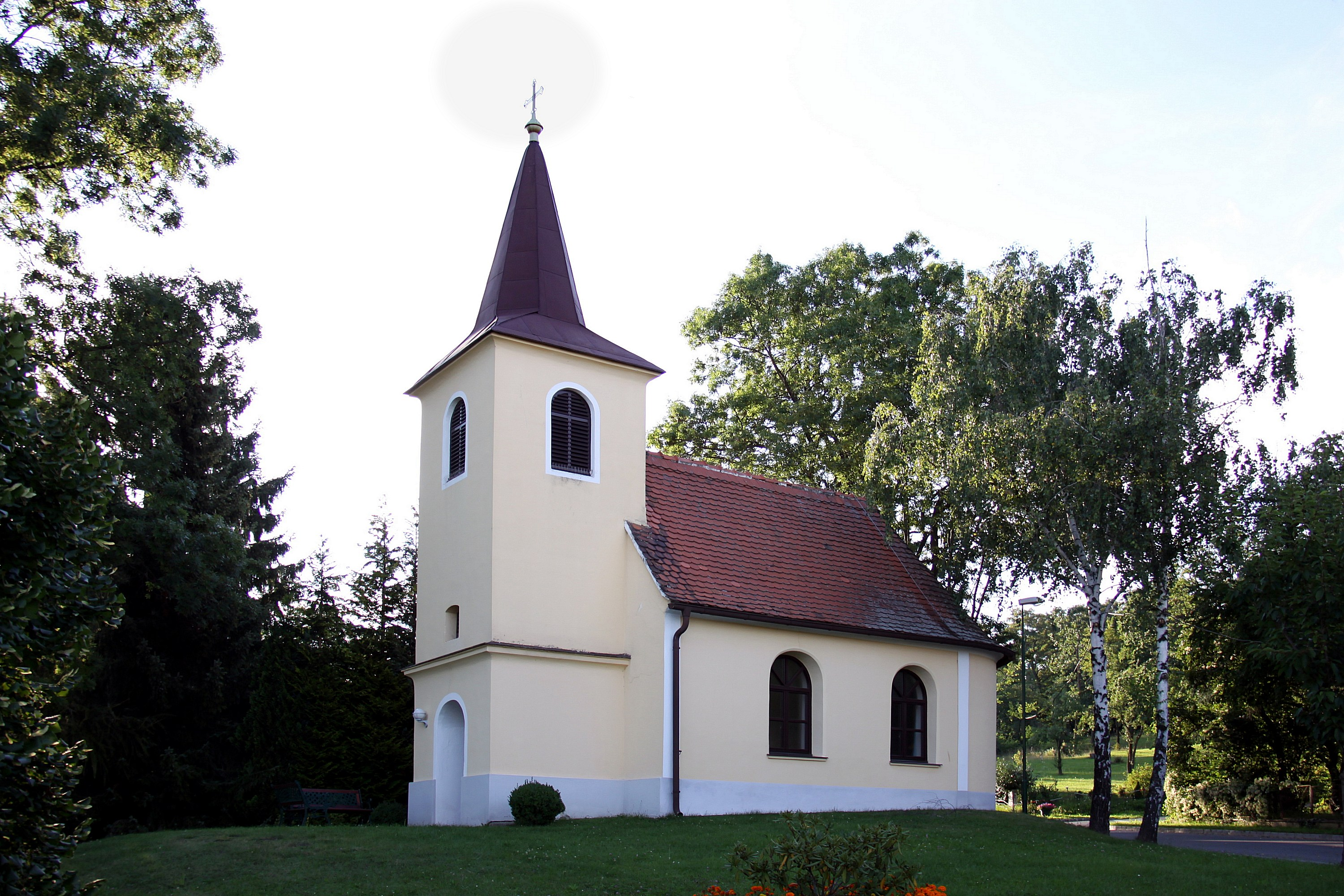 Weiden bei Rechnitz - Filialkapelle Mariae Namen in Mönchmeierhof Object location47° 19′ 20.82″ N, 16° 18′ 27.59″ E